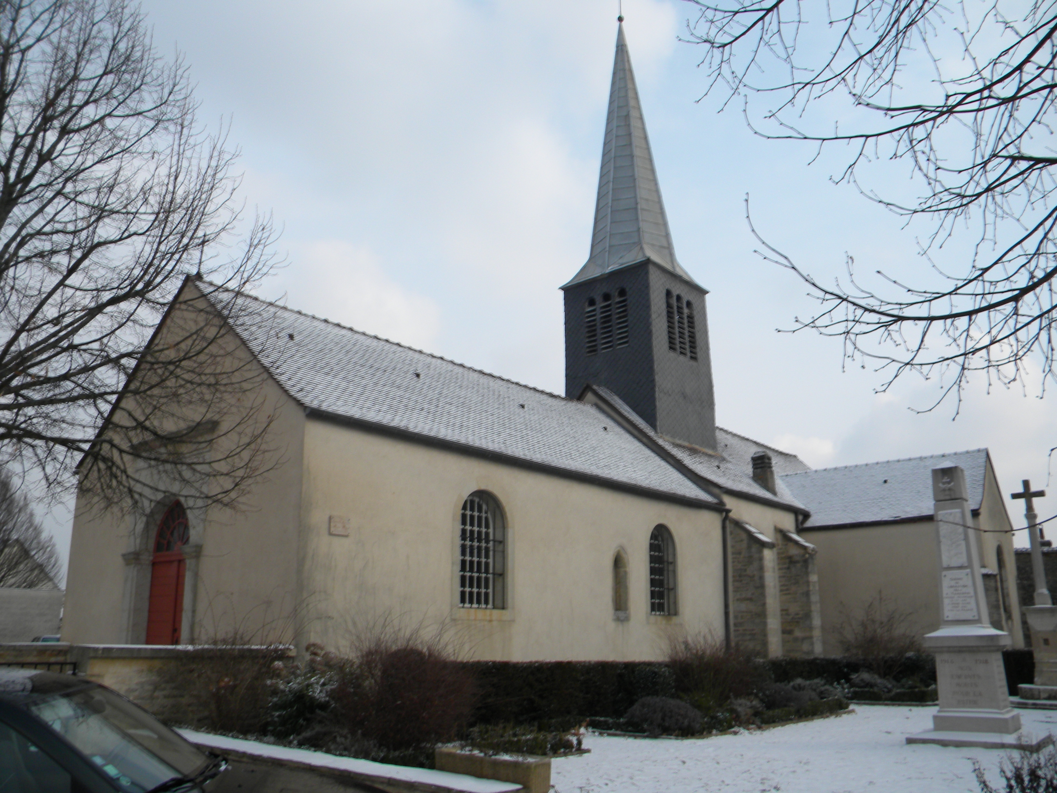 Kirko de Montagny-lès-Beaune